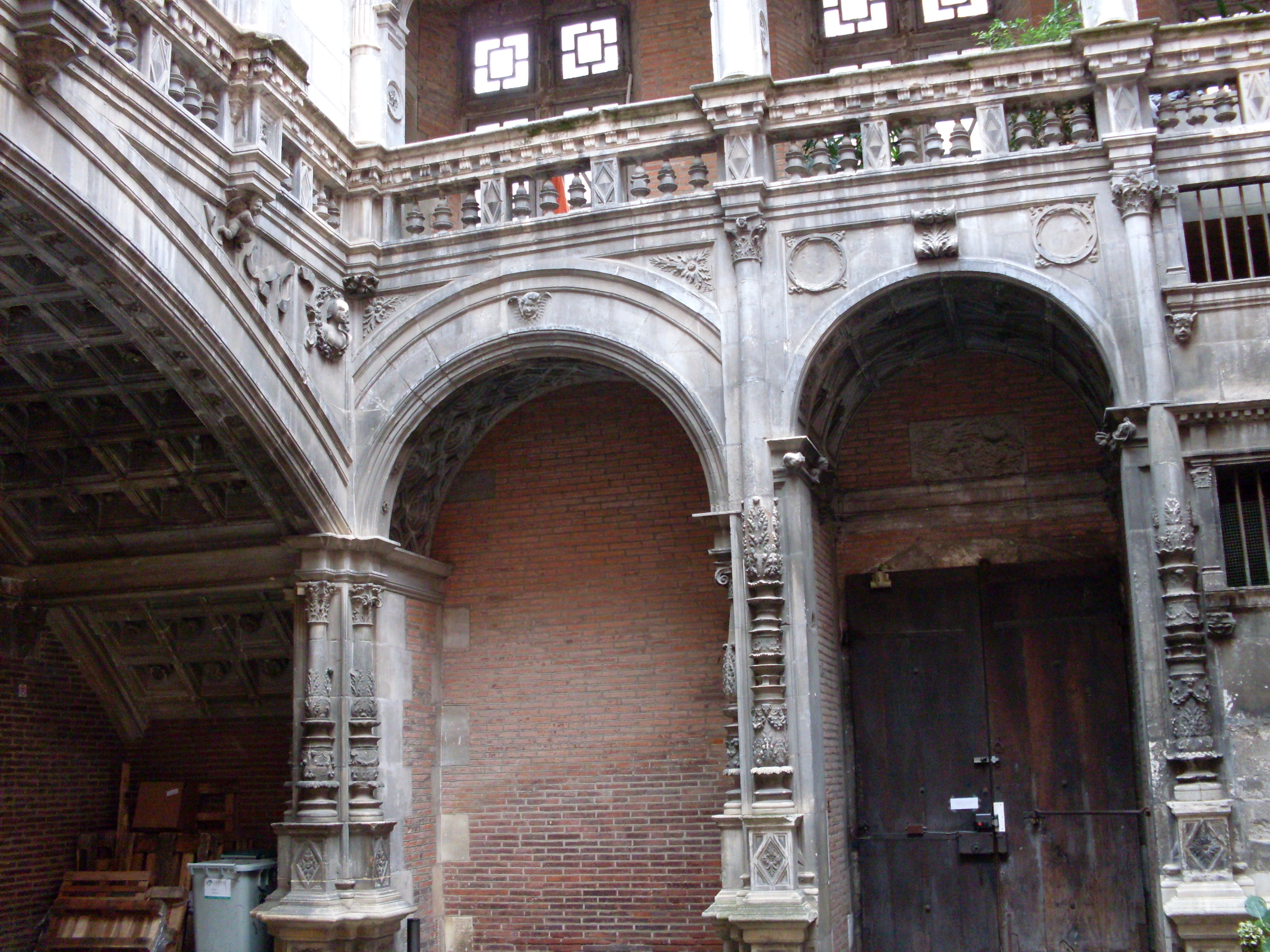 Hôtel de Bernuy / lycée Fermat, la première cour